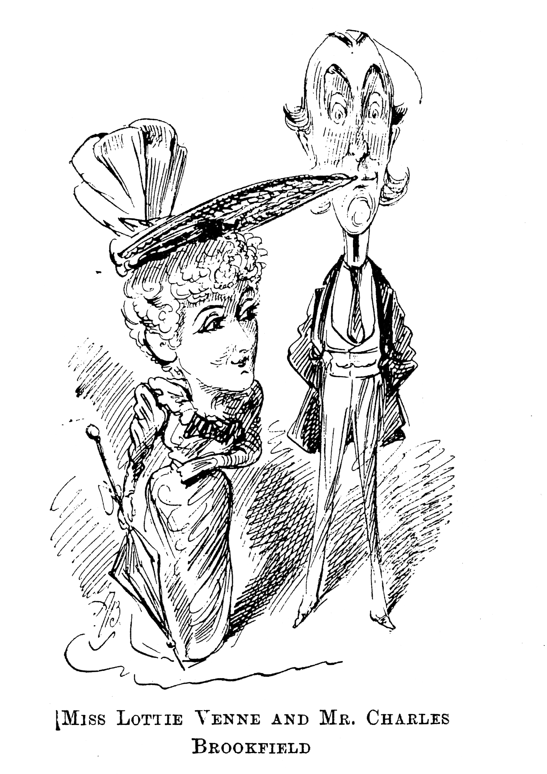 Lottie Venne and Charles Brookfield